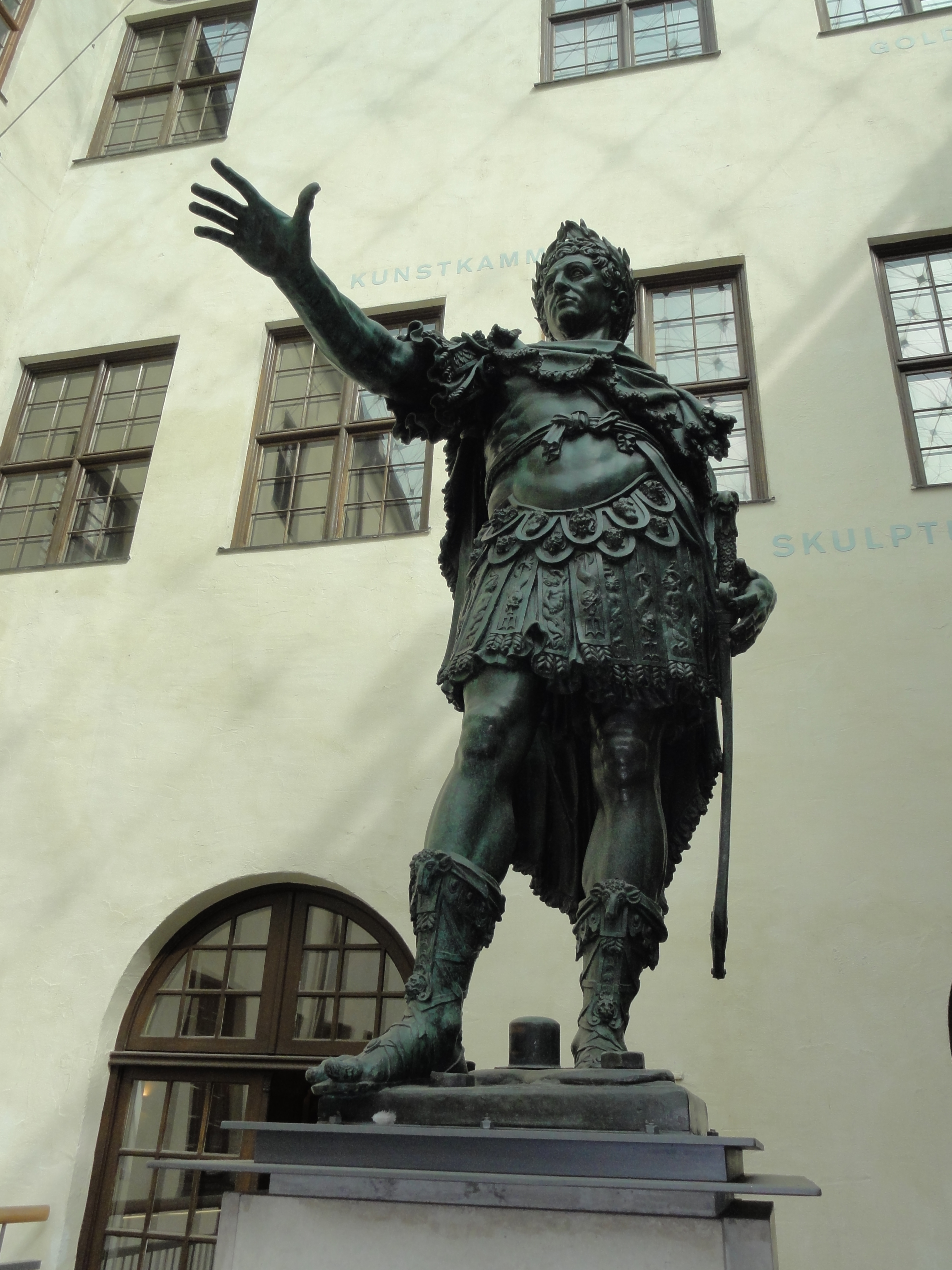 Augsburg